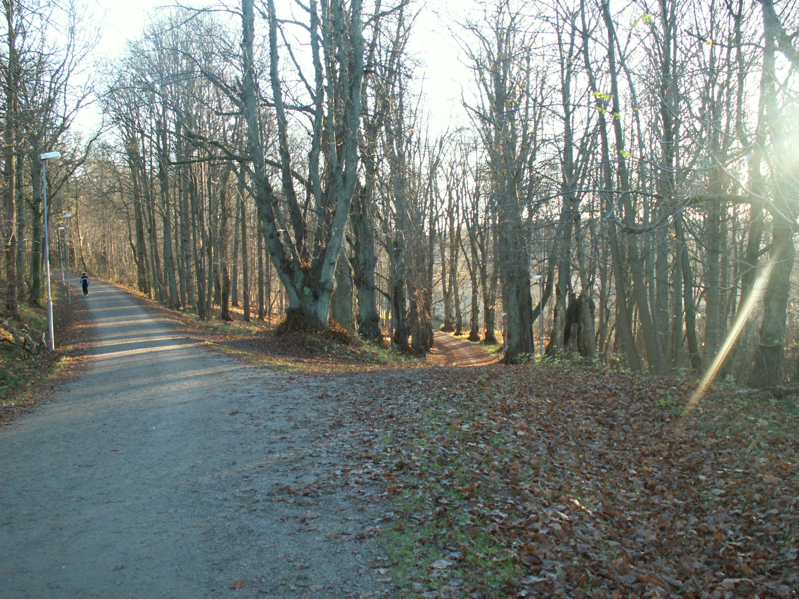 Korsningen Härlanda Skogsväg/Olbersgatan i Kålltorp i östra Göteborg. Strax till höger om bilden breder Apslätten ut sig.